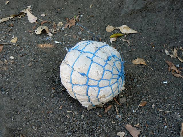 Football in Timor-Leste